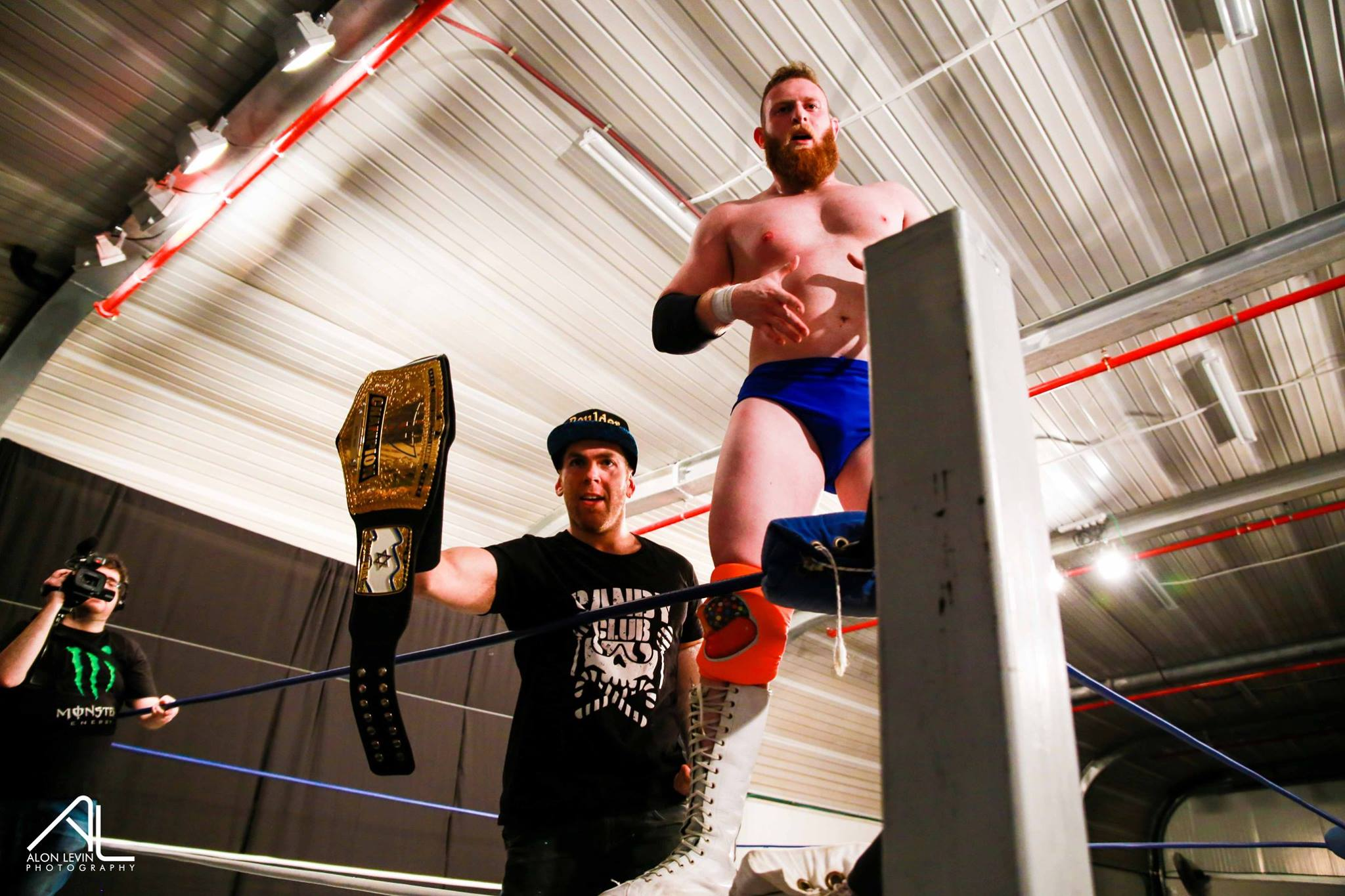 שי קראשר (עם קנדי בולדר) לאחר הניצחון בקרב הרויאל ראמבל ב-IWL12 (צילום: אלון לוין)